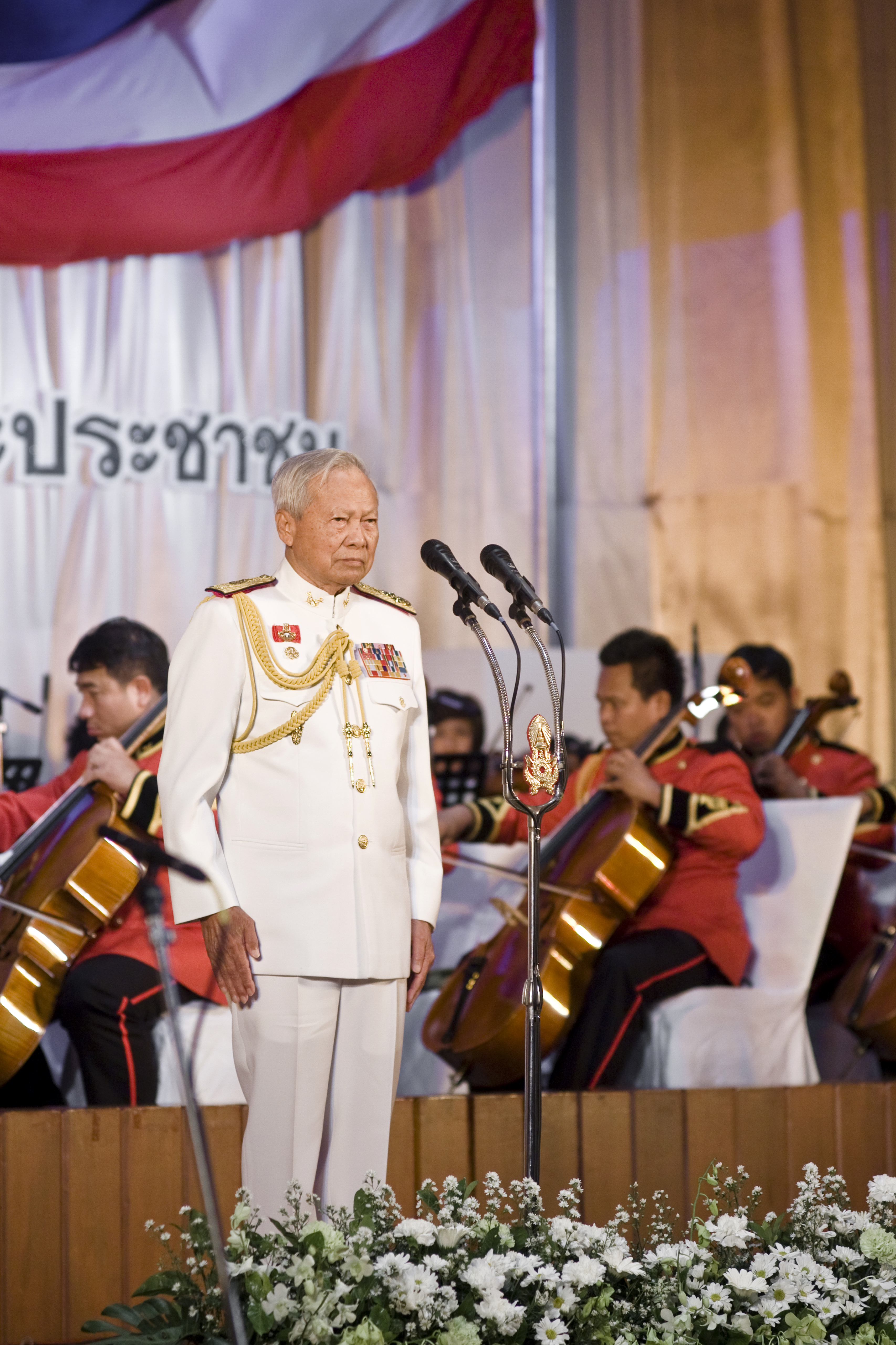 พลเอก เปรม ติณสูลานนท์ ประธานองคมนตรีและรัฐบุรุษ / นายกรัฐมนตรี ร่วมงานเลี้ยงรับรองเนื่องในวันกองทัพบก ณ ห้องมัฆวานรังสรรค์ สโมสรทหารบก ถนนวิภาวดีรังสิต กรุงเทพฯ 20 มกราคม 2553 (The Official Site of The Prime Minister of Thailand Photo by พีรพัฒน์ วิมลรังครัตน์)